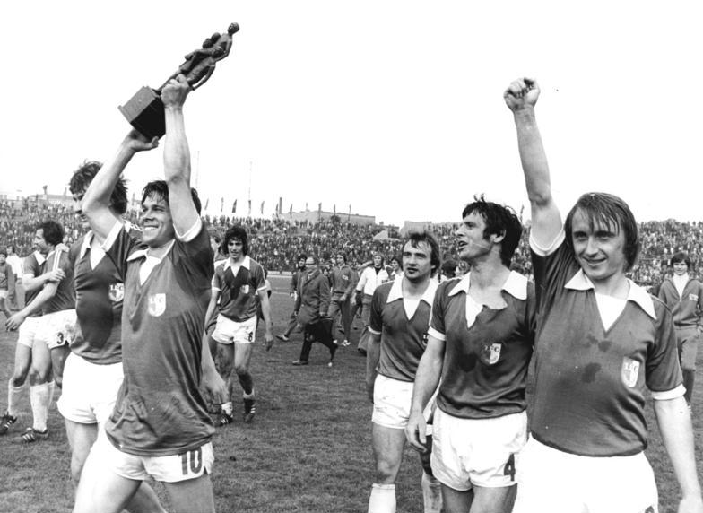 ADN-ZB Mittelstädt 29.4.78 Berlin: FDGB-Fussballpokalendspiel 1. FC Magdeburg - Dynamo Dresden Der 1. FC Magdeburg gewann am 29.4.78 vor 50.000 Zuschauern im Stadion der Weltjugend in Berlin das Endspiel um den FDGB-Fußballpokal gegen Dynamo Dresden mit 1:0 (1:0) und errang damit zum fünften Mal die Trophäe. Hier Jürgen Sparwasser mit der Siegertrophäe. Neben ihm v.l.n.r. seine Mannschaftskameraden Detlef Raugust, Wolfgang Seguin und Joachim Streich.